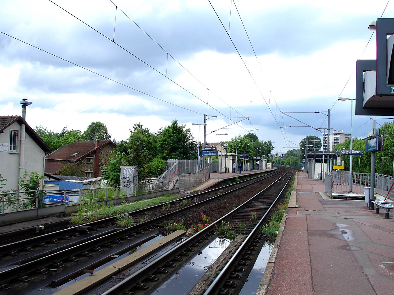 Gare du Champ de courses d'Enghien à Soisy-sous-Montmorency (Val-d'Oise).